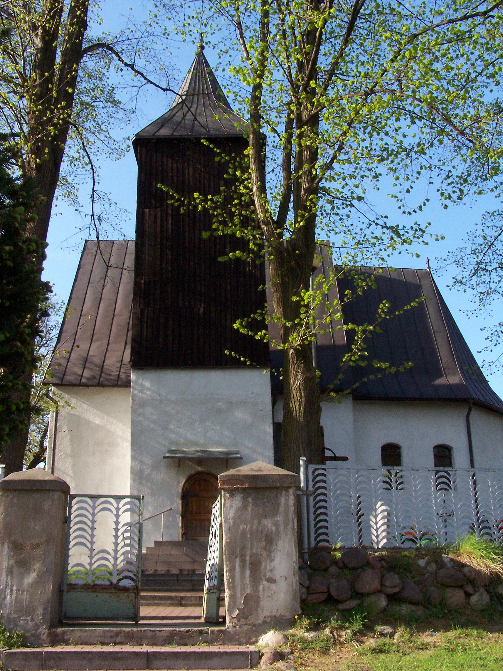 Żelazny Most - kościół parafialny pw. św. Barbary (zabytek nr A/2557/854 z 22.02.1961)